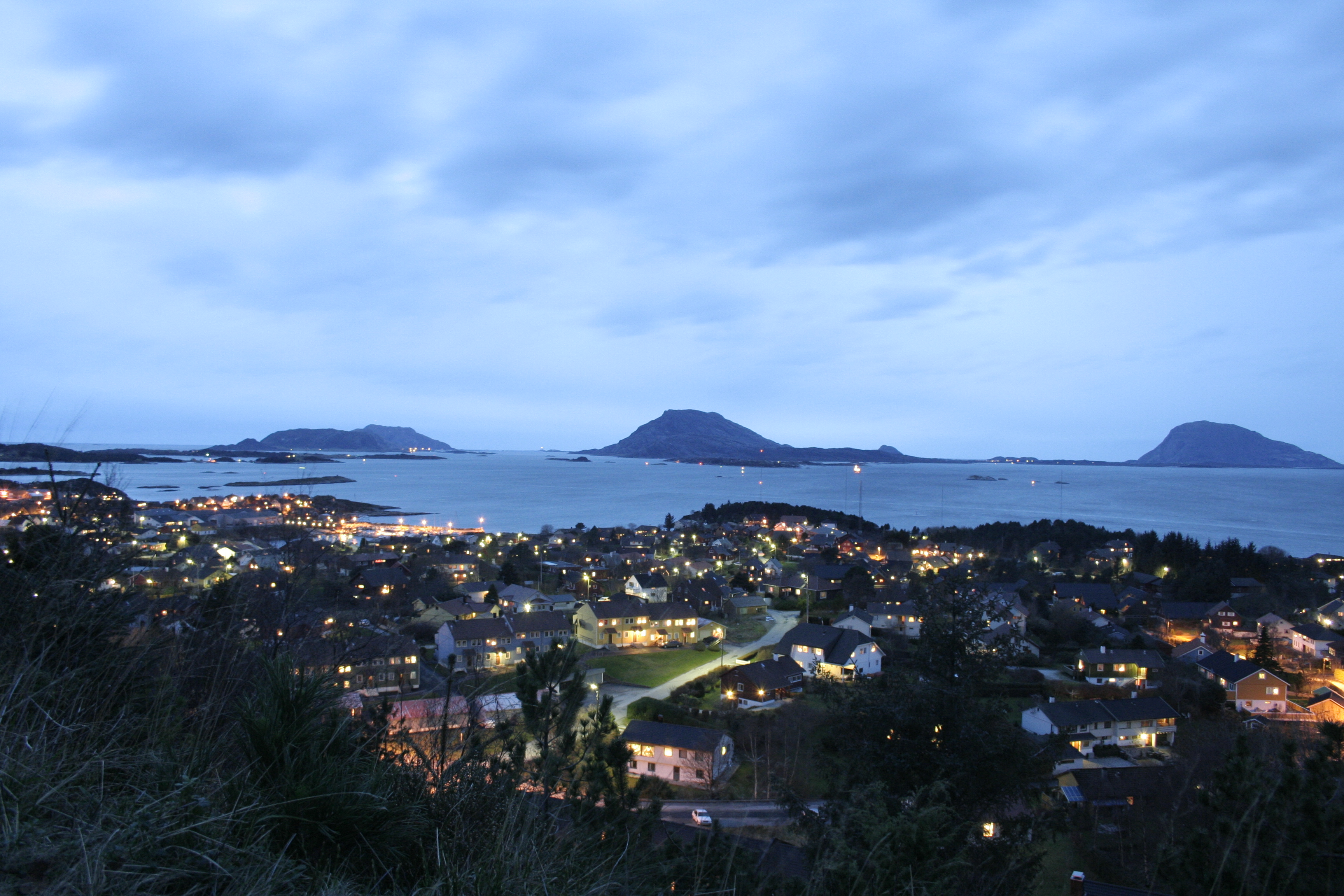 floro wieczorem